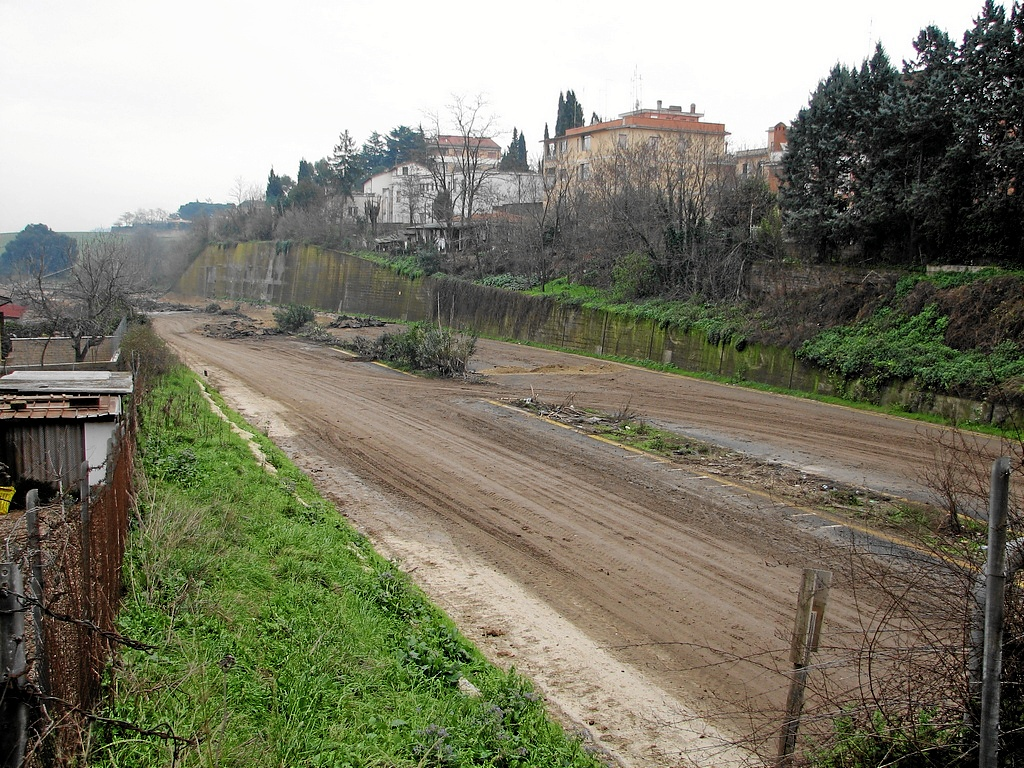 Vecchio tracciato del Grande Raccordo Anulare di Roma, all'altezza di Via Trionfale, febbraio 2007, in corso di demolizione.